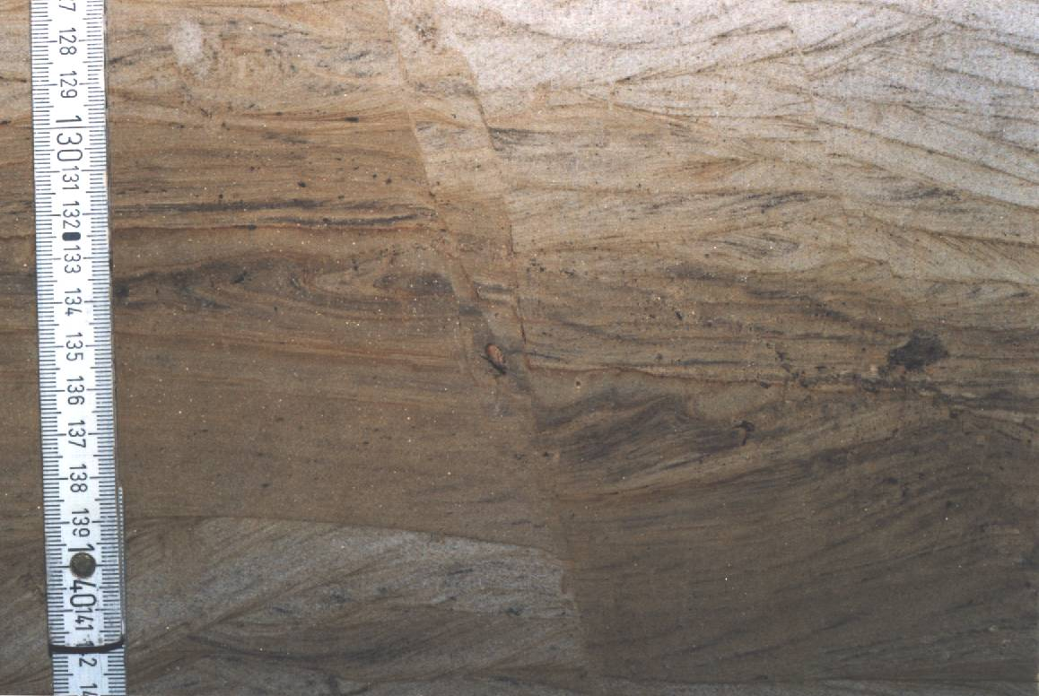 Durch das Abschmelzen eines benachbarten Toteisblockes entstandene Abschiebung in eiszeitlichen Eisstauseeablagerungen (bei Oderin, Gemeinde Halbe/Brandenburg). Die Sedimente auf der rechten Seite des Bildes sind gegenüber denen auf der linken Seite um etwa 3 cm abgesackt.